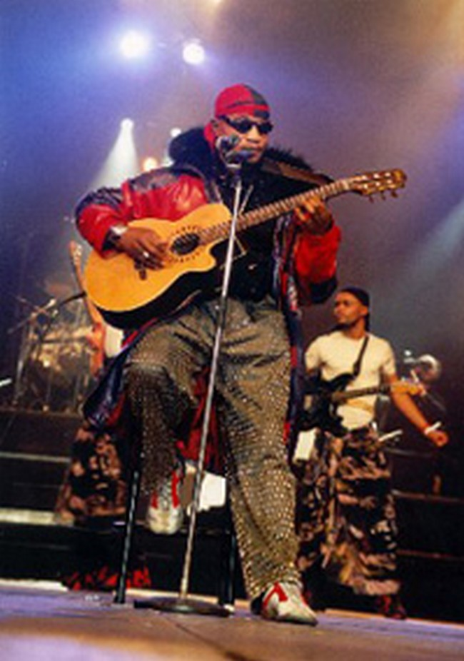 Koffi Olomidé "Nkolo Lupemba" lors de son méga-concert au Palais Omnisports de Paris-Bercy le 19 février 2000.